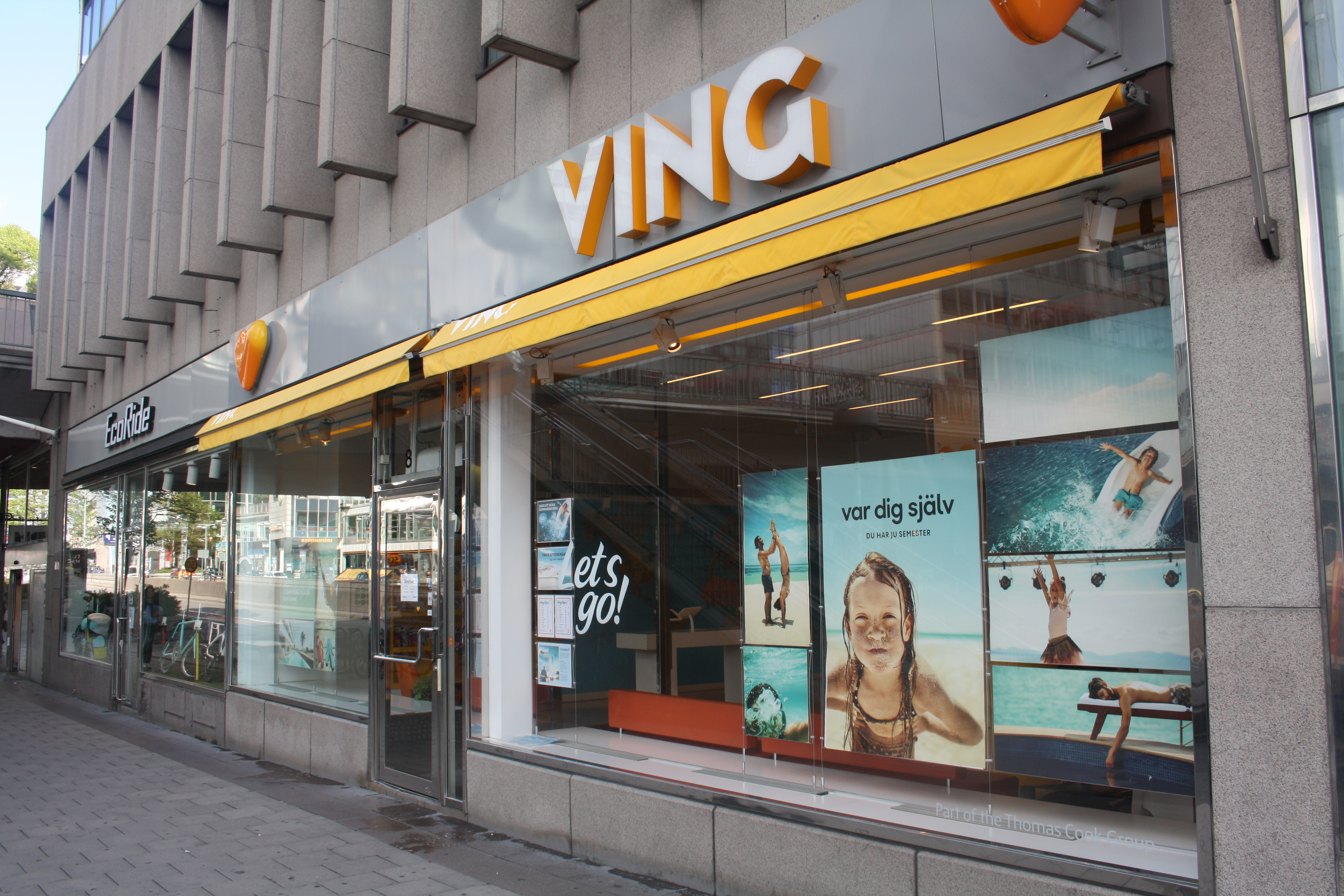 Ving på Sveavägen